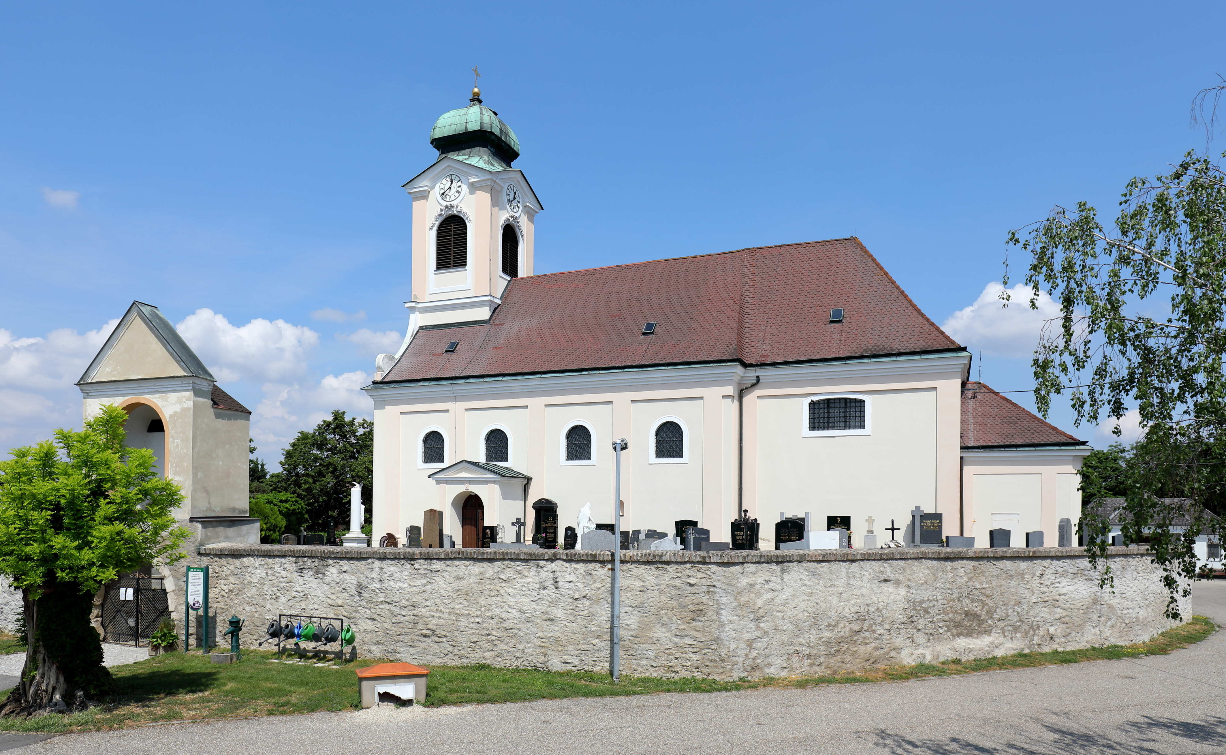 Südansicht der röm.-kath. Pfarrkirche hl. Veit in der niederösterreichischen Gemeinde Untersiebenbrunn. Die in erhöhter Lage errichtete Kirche ist von einem Friedhof mit Mauer umgeben. Die barocke Kirche wurde 1710 anstelle einer mittelalterlichen Wehrkirche, die zuvor großteils abgetragen wurde, errichtet.